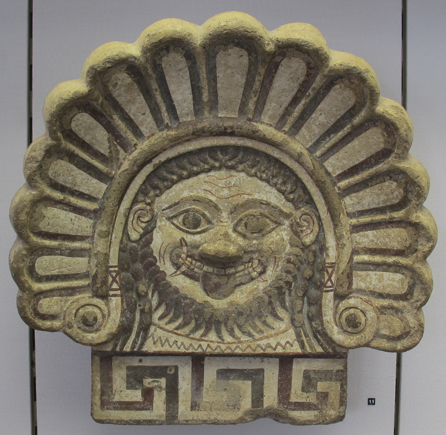 Campania, antefissa, 550-525 ac. ca